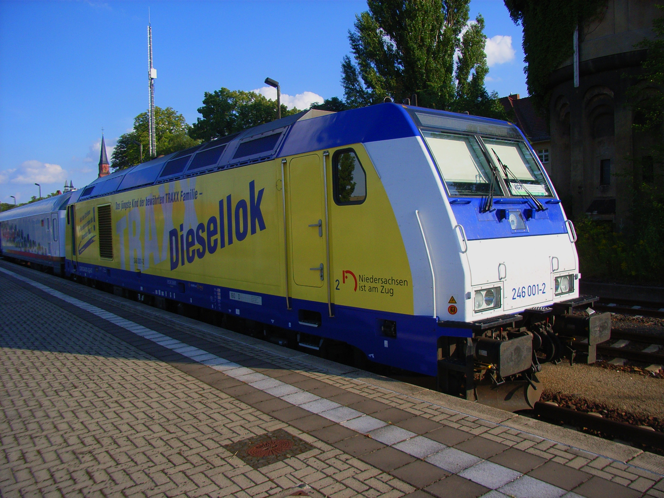 Diesellokomotive der Traxx-Familie von Bombardier mit dem "SciencExpress" am Haken